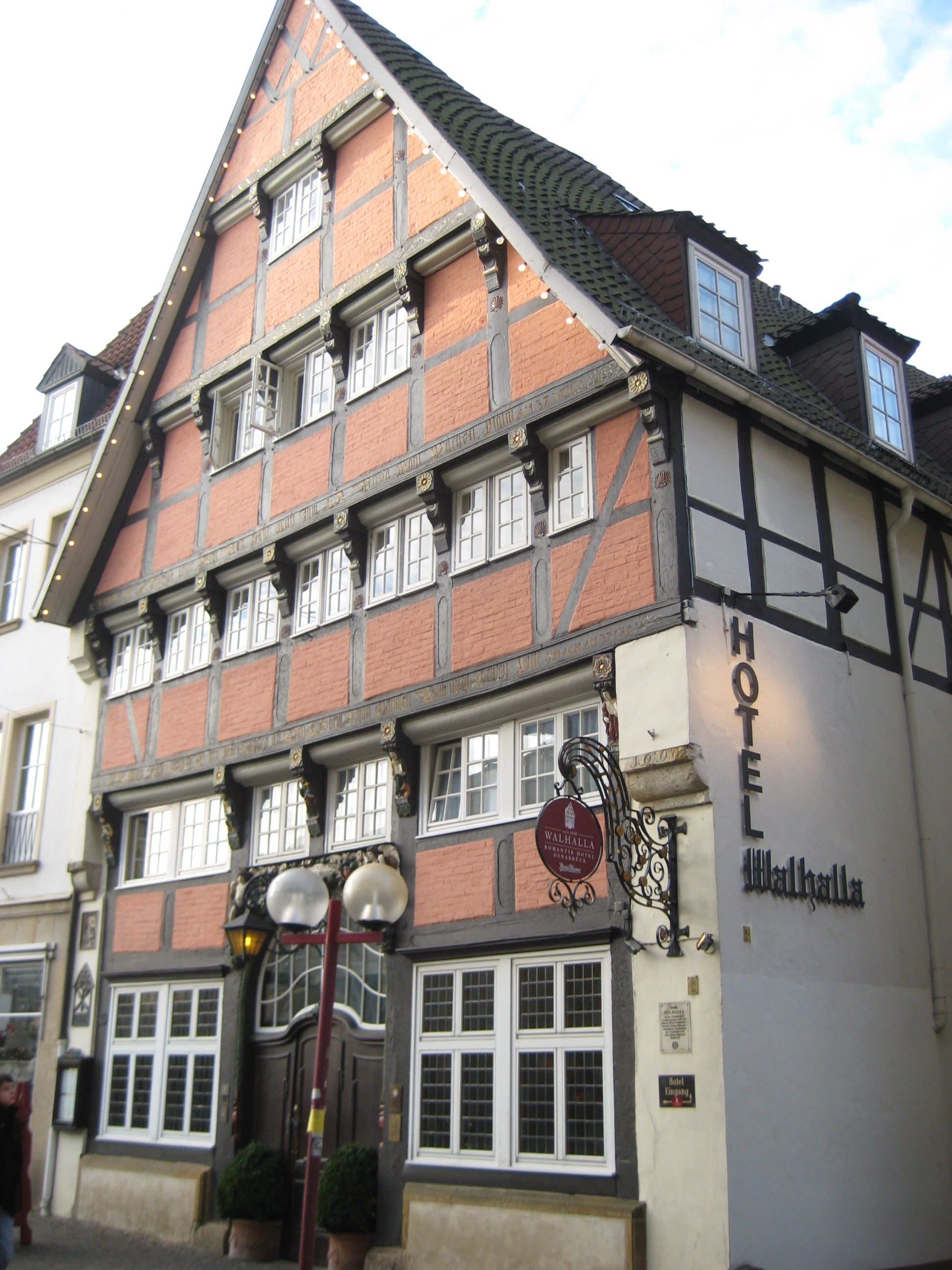 Hotel Walhalla in Osnabrück